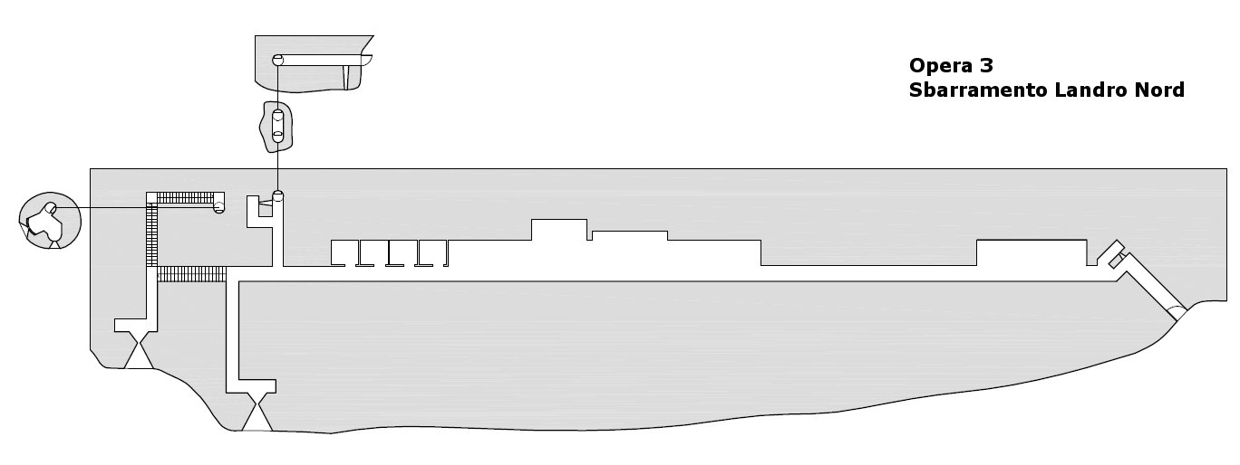 Piantina opera 3, landro nord